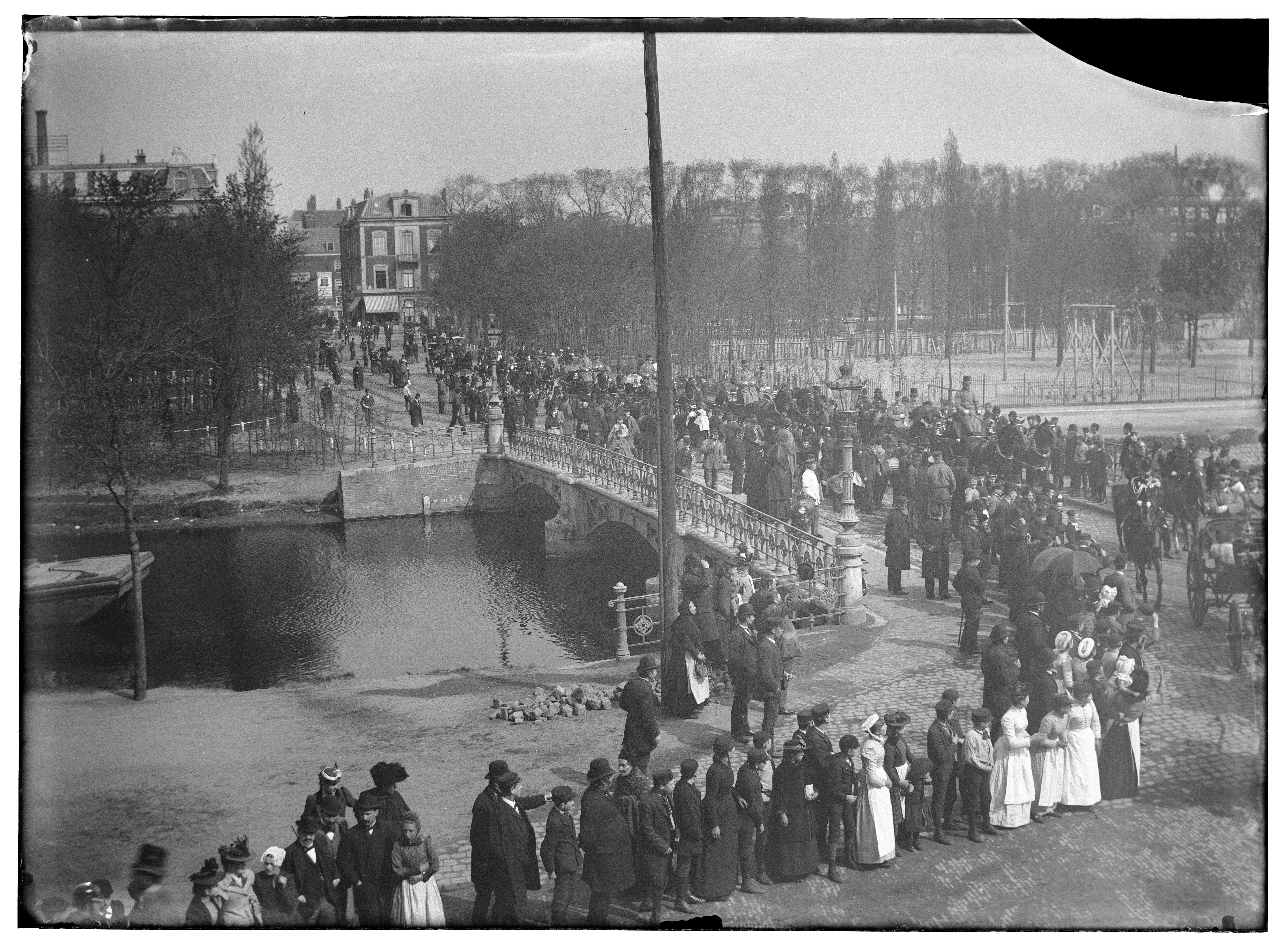 Beschrijving Stadhouderskade ter hoogte van nr. 77 Bezoek koningin Wilhelmina. Gezien naar de Singelgracht met brug nr. 84 voor de Ferdinand Bolstraat. Links het Eerste Weteringplantsoen met ingang Nieuwe Vijzelstraat / Vijzelgracht. Rechts het Tweede Weteringplantsoen met Openbare Speeltuin Nr.1. Documenttype foto Vervaardiger Olie``, Jacob (1834-1905) Collectie Collectie Jacob Olie Jbz. Datering 1892 Geografische naam Stadhouderskade Inventarissen Afbeeldingsbestand 010019001813 Generated with Dememorixer